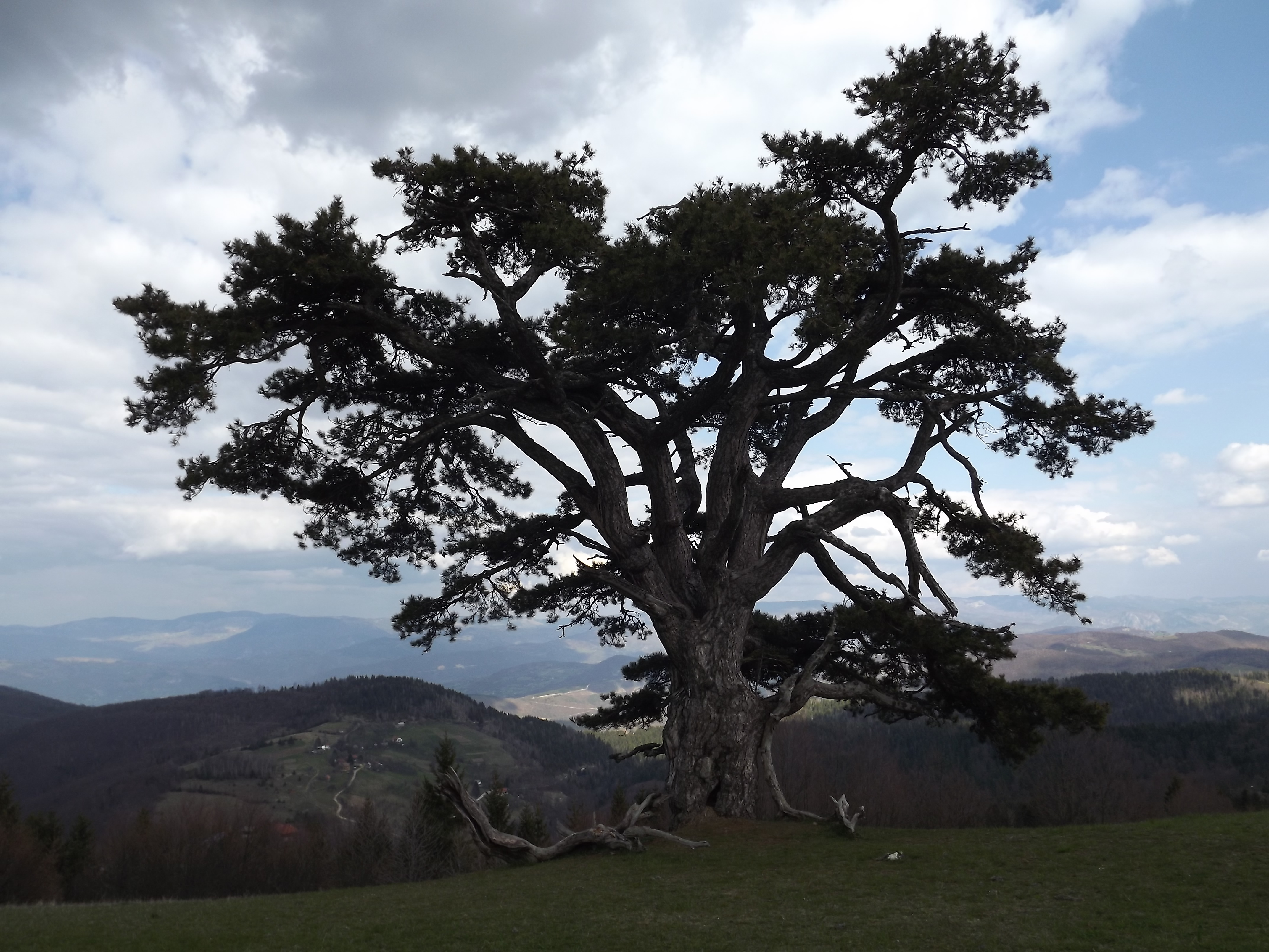 Ово је фотографија заштићеног природног добра у Србији под шифром: ПИО15 This is a a photo of a natural area in Serbia with ID: ПИО15 Предео изузетних одлика Камена Гора